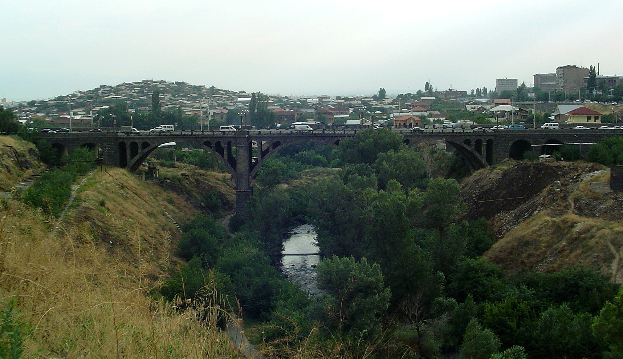 Haghtanak bridge in Yerevan